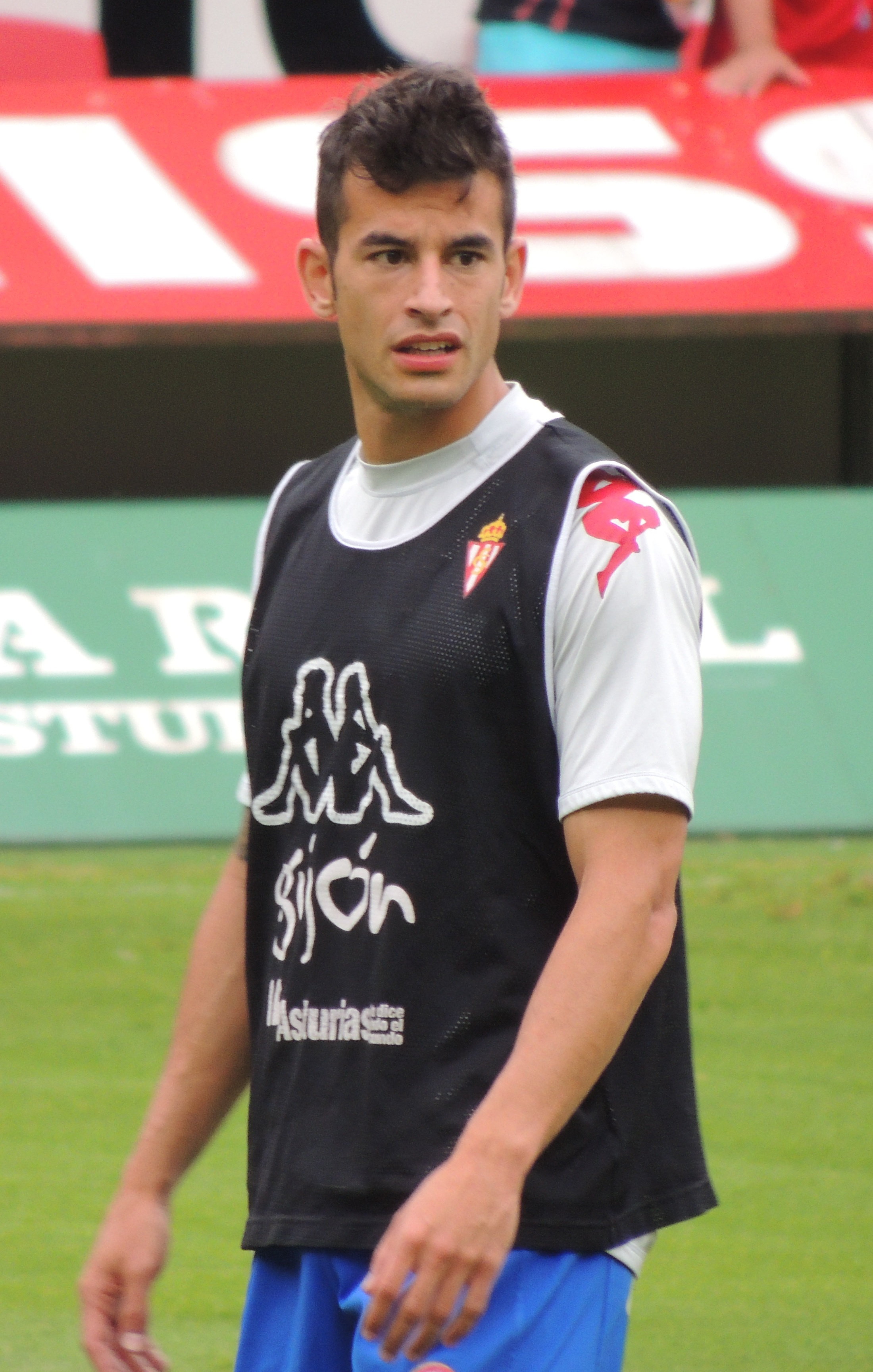 Calentamiento previo a partido contra UD Las Palmas en El Molinón.